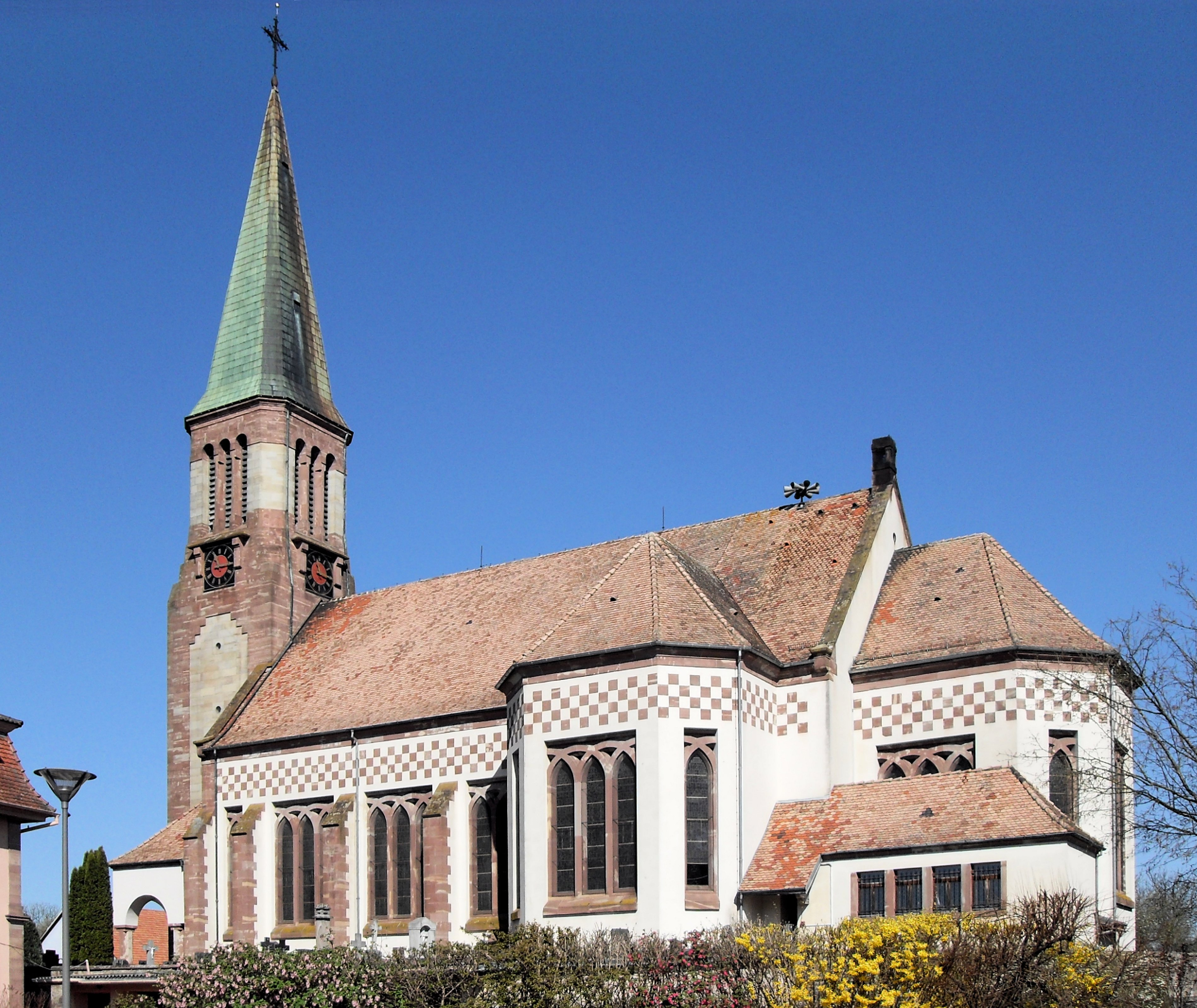 L'église Saint-Boniface à Burnhaupt-le-Haut